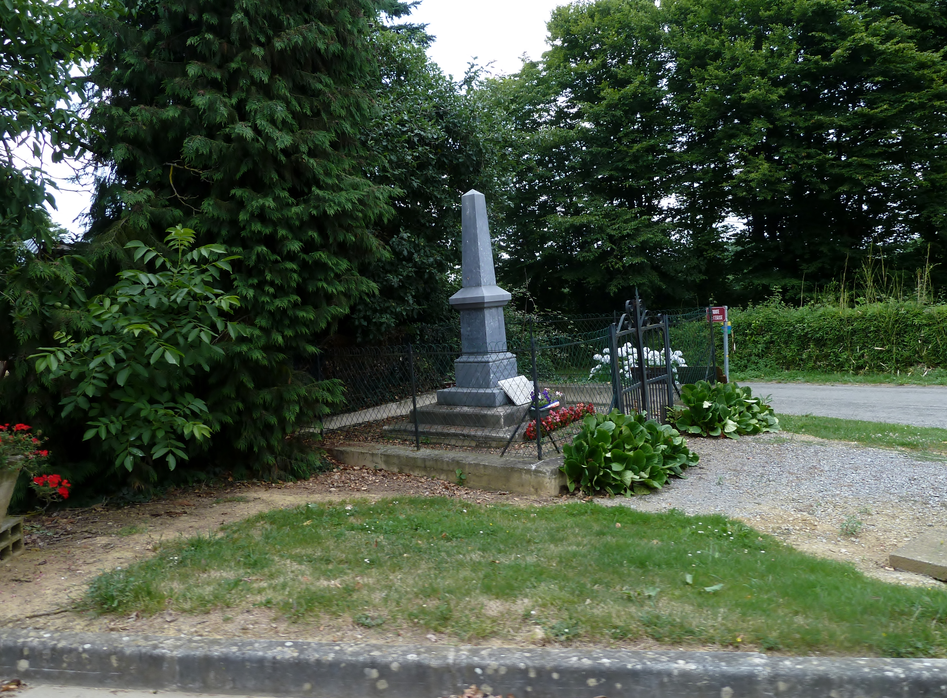 Monument aux morts de Moncaup (Pyrénées-Atlantiques)